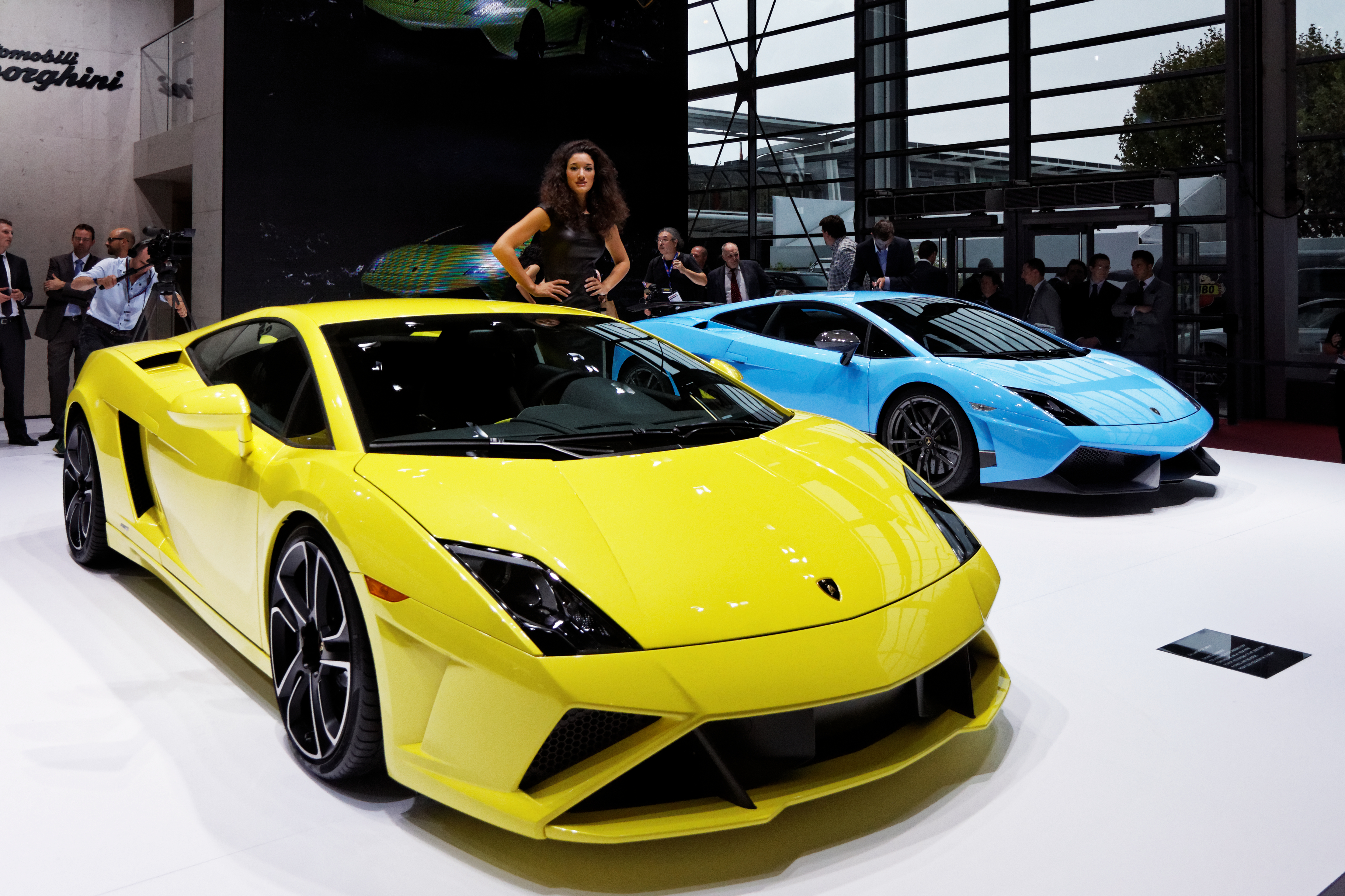 Une Lamborghini Gallardo LP 560-4 présentée lors du Mondial de l'Automobile de Paris 2012.